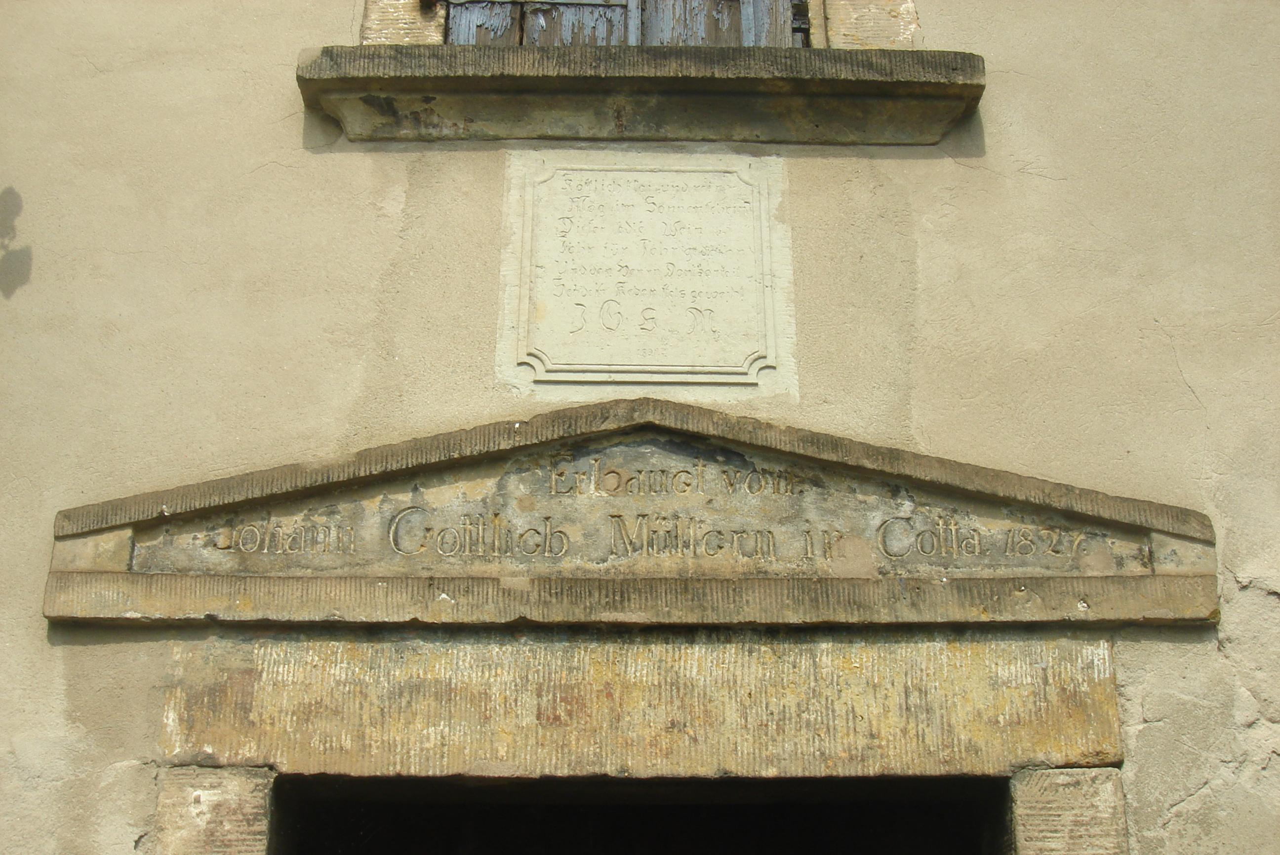 Fassadendetail an einem alten Gartenpavillon zwischen ehemaligem Hofbrauhaus Cotta und Theater Junge Generation